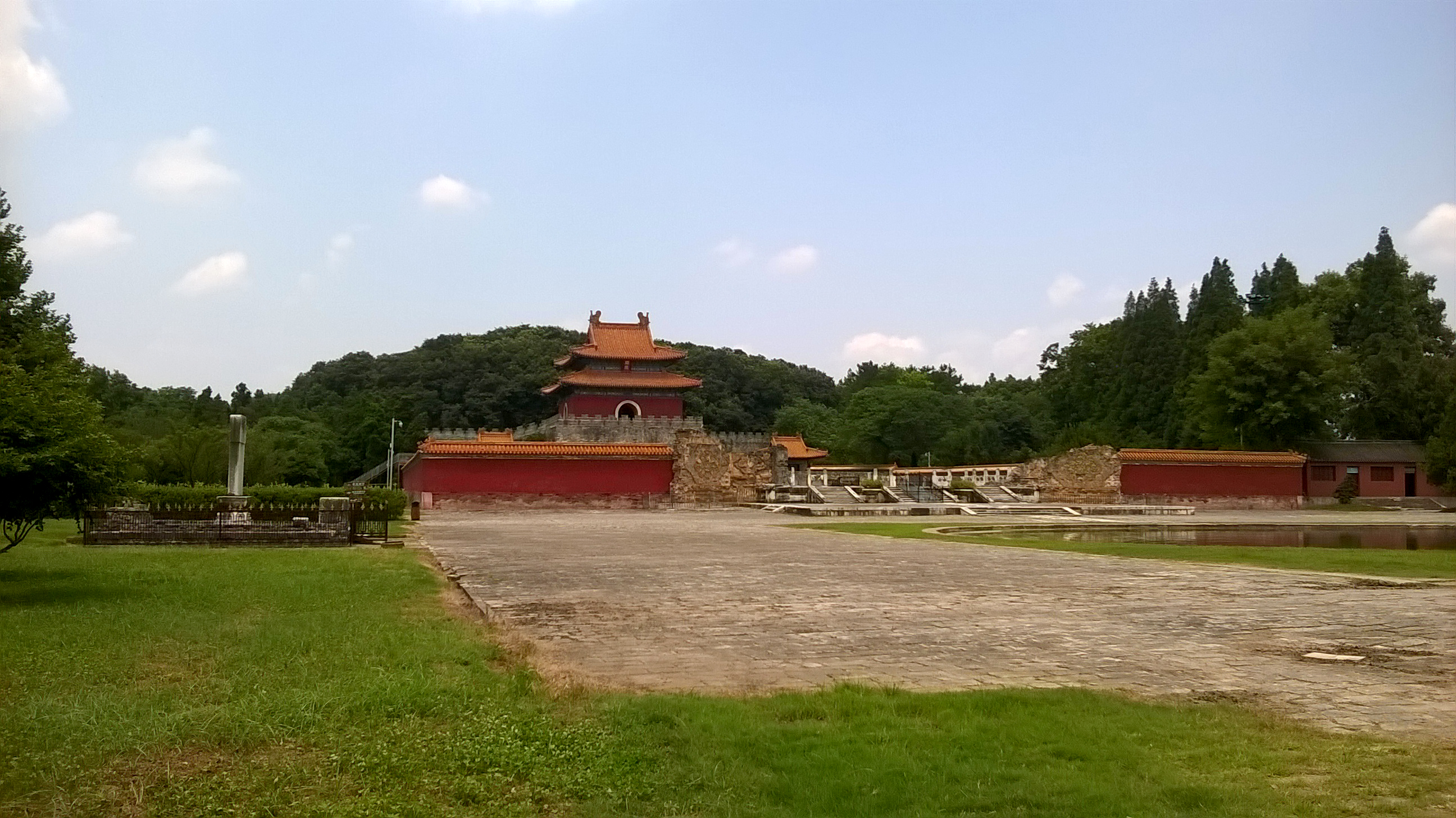 明显陵，棱恩殿遗址和明楼。